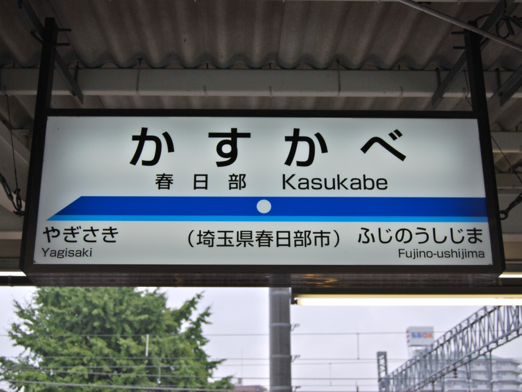 東武鉄道野田線春日部駅8番線駅名標（2008/10/24撮影）